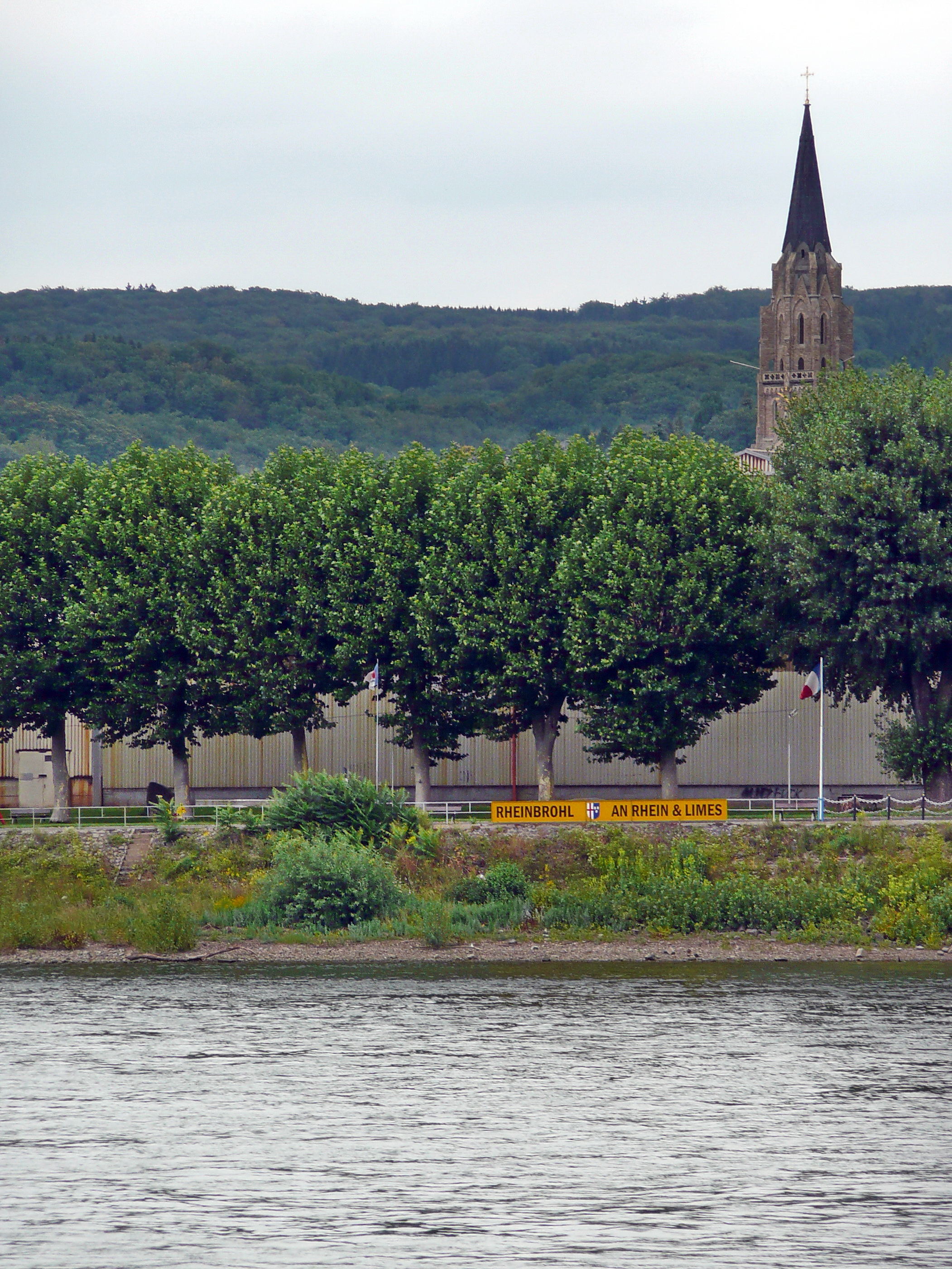 Eglise St. Suitbert de Rheinbrohl, vu de l'autre coté du Rhin